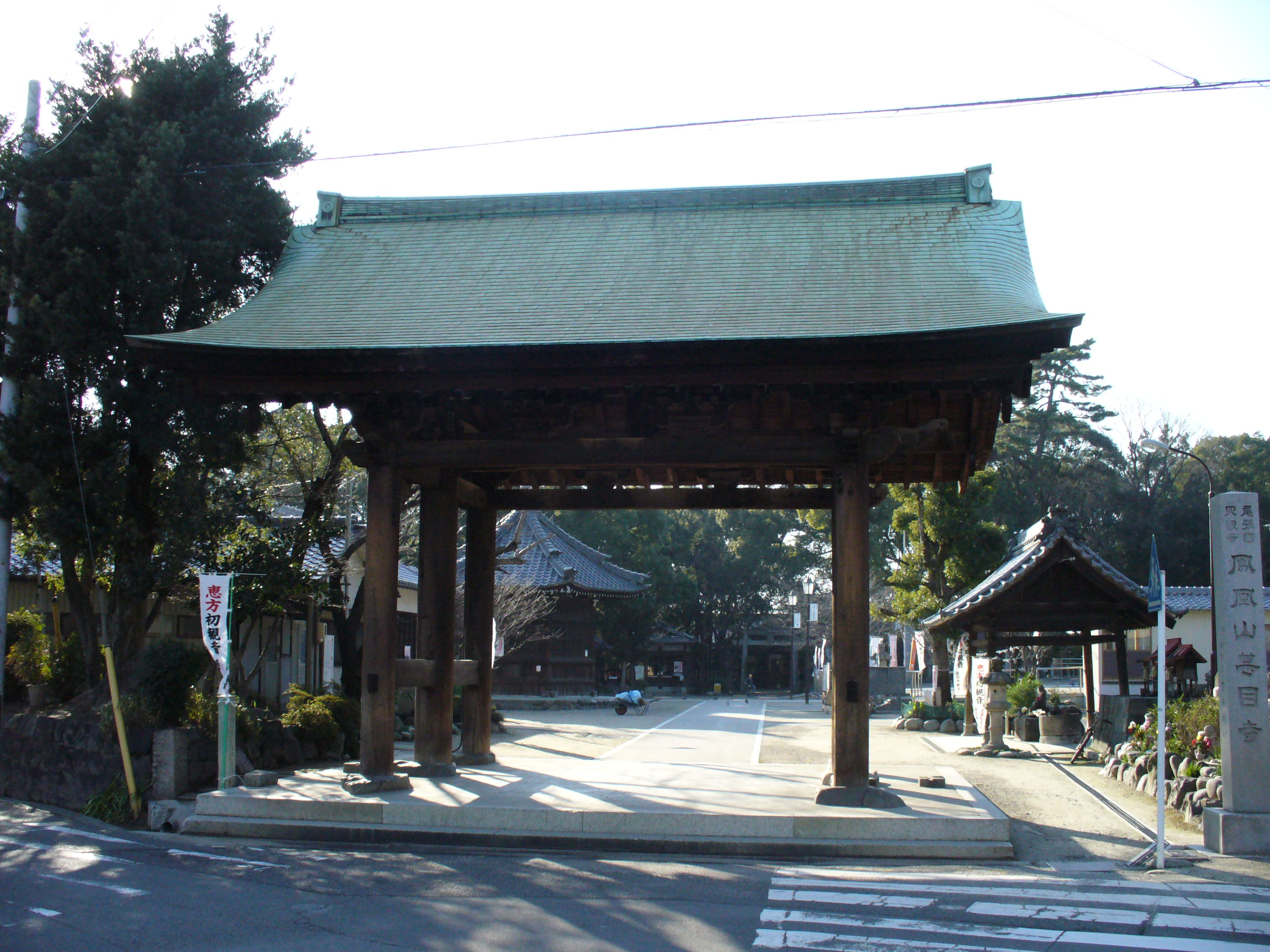 Jimokuji Higashimon（甚目寺東門）